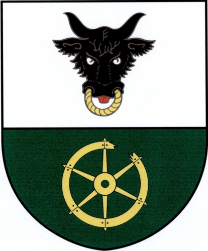 znak, Ubušínek, okres Žďár nad Sázavou